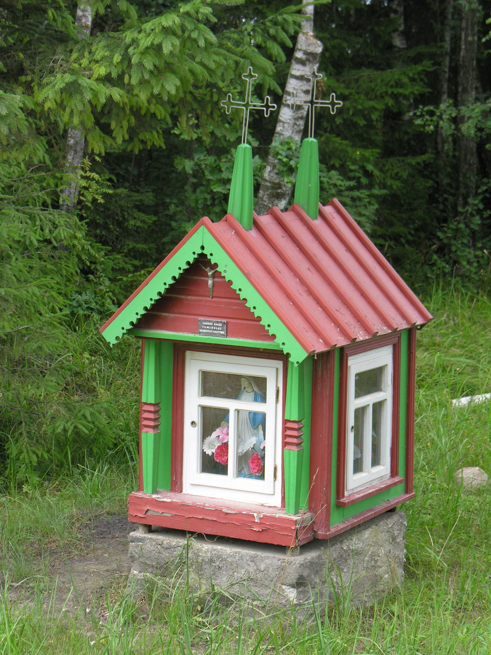 Balėnų koplytėlė - valstybės saugomas dailės paminklas, Mažeikių raj. Fotografavo: Algirdas, 2005 m. rugpjūčio 6 d.